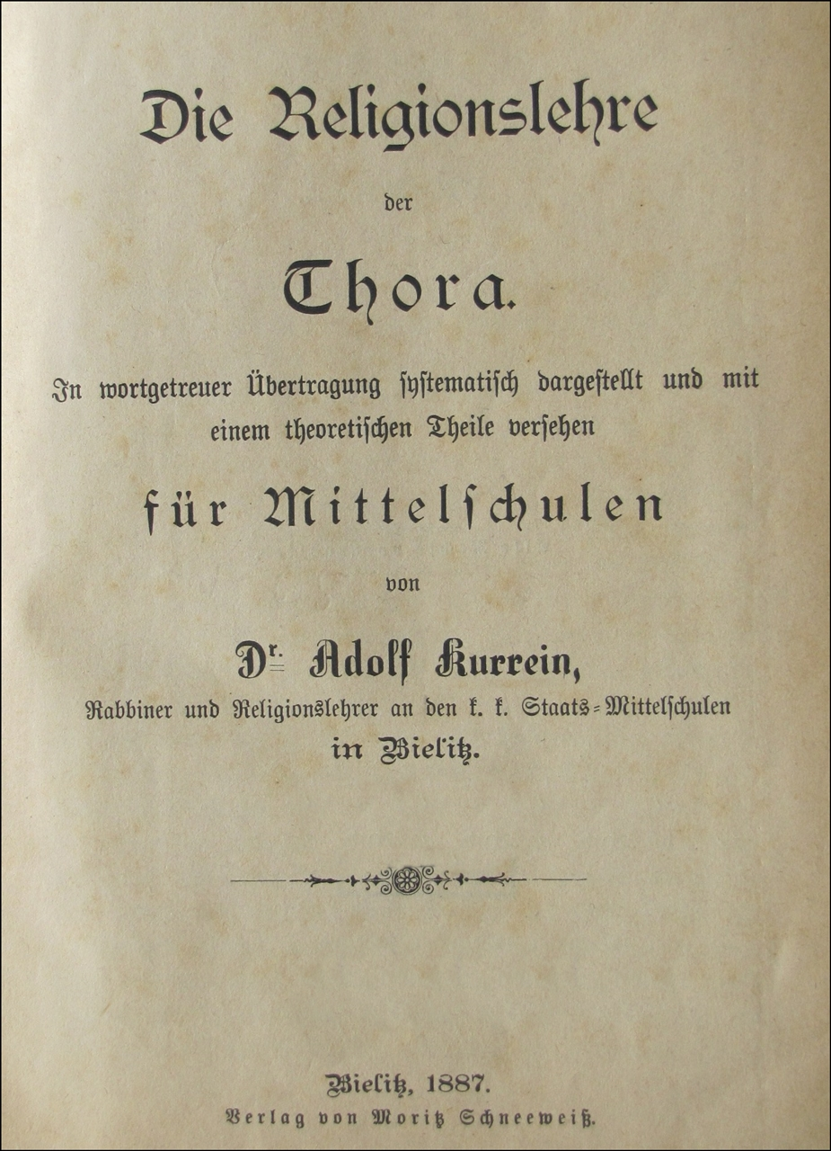 Adolf Kurrein, Die Religionslehre der Thora: in Wortgetreuer Uebertragung systematisch dargestellt und mit einem theoretischen Theile versehen fuer Mittelschulen, Bielitz 1887